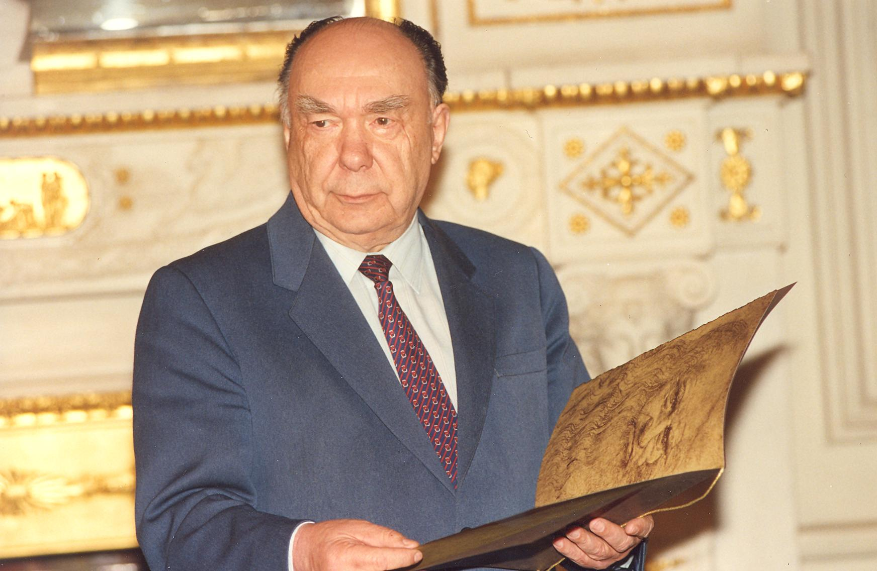 Международная Леонардо-премия